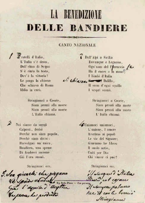 Copia di fratelli d'Italia con correzioni autografe di Goffredo Mameli. Prima copia stampata su foglio volante a Genova dalla tipografia Casamara e distribuito il 10 dicembre a coloro che presero parte al corteo in Oregina. Mameli aggiunse a penna l’ultima strofa del suo inno, censurata perché troppo palesemente antiaustriaca.